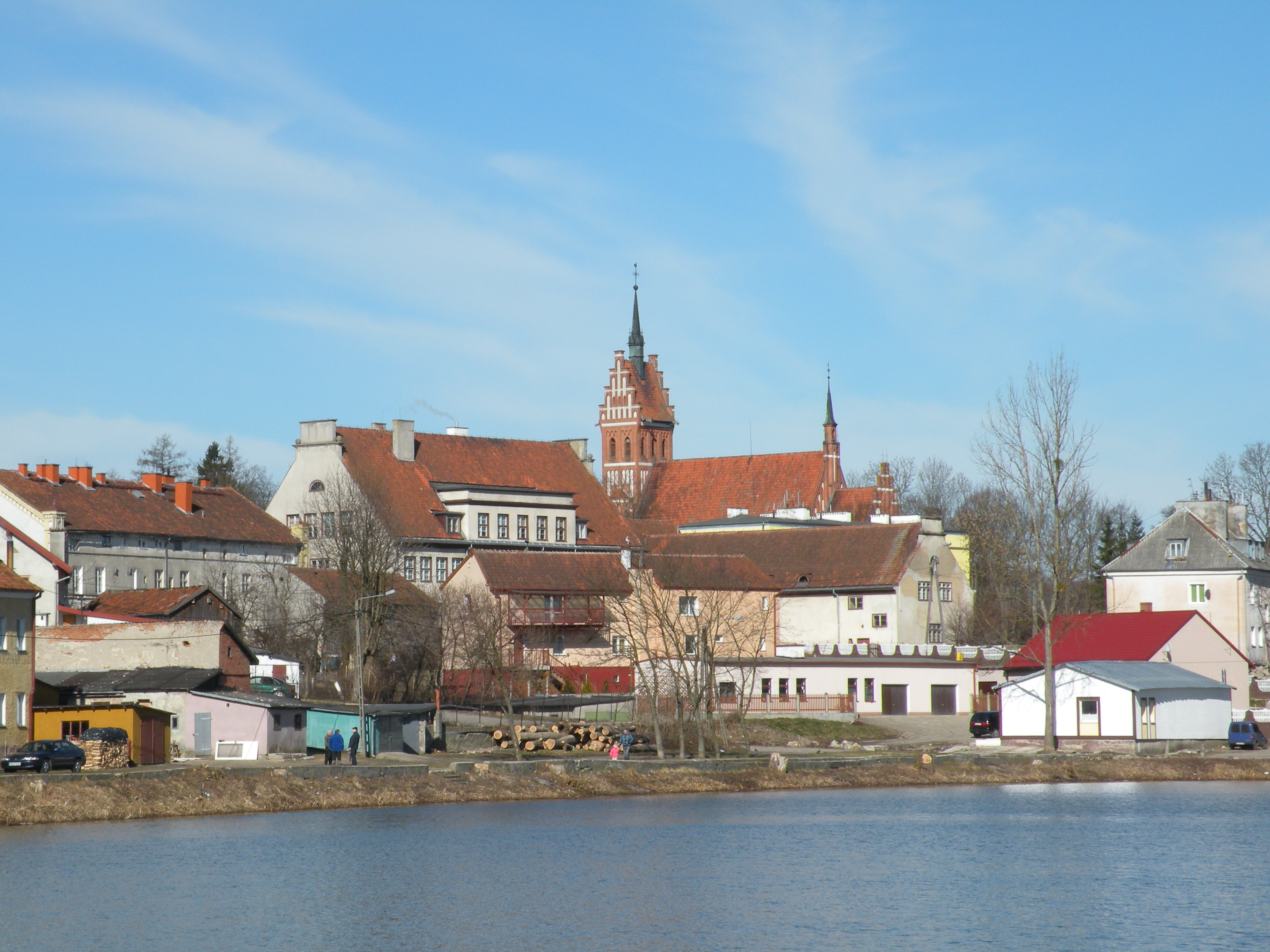 Widok na miasto, z widoczną wieża kościoła Największego Serca Pana Jezusa.